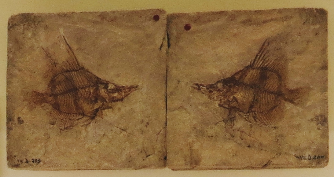 Fossil - Took the picture at Museo di storia naturale di Verona